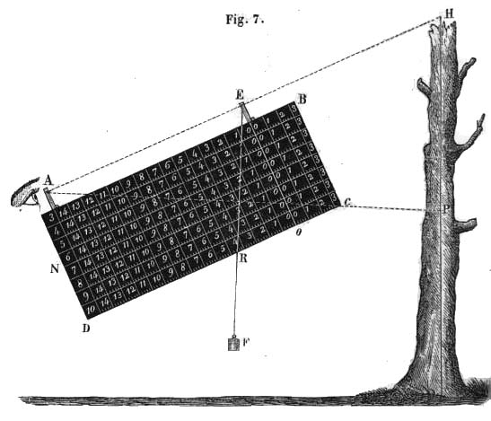 Appareil servant à mesurer la taille des arbres